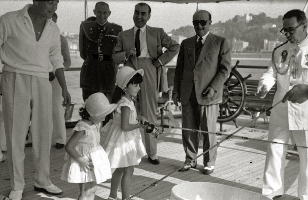 Título original: Franco y sus nietos en el Azor (3/4) Localización: Guipúzcoa